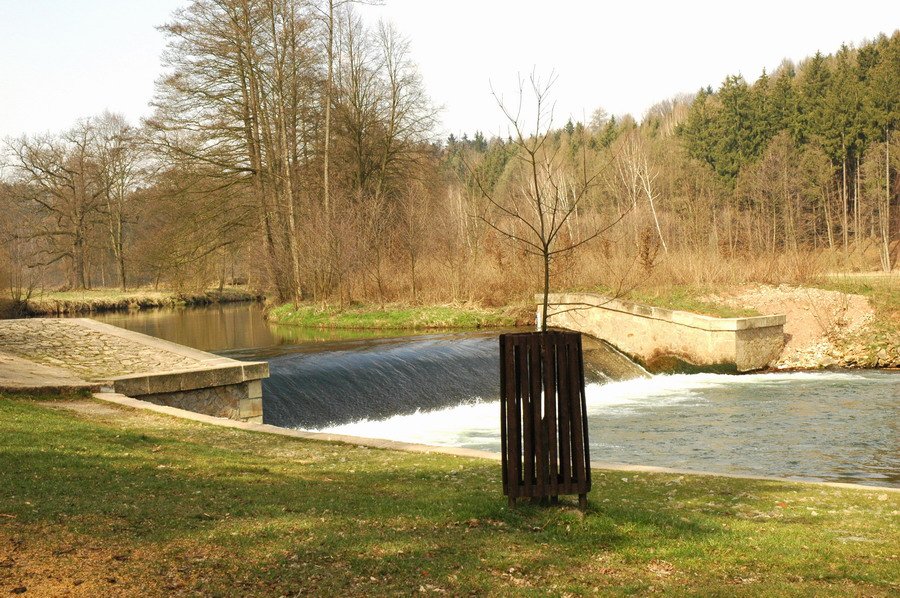 Ratibořice; Viktorčin splav. Řeka Úpa odděluje katastry Ratibořic (čili města Česká Skalice) na pravém (jižním) a obce Žernov na levém (severním) břehu.